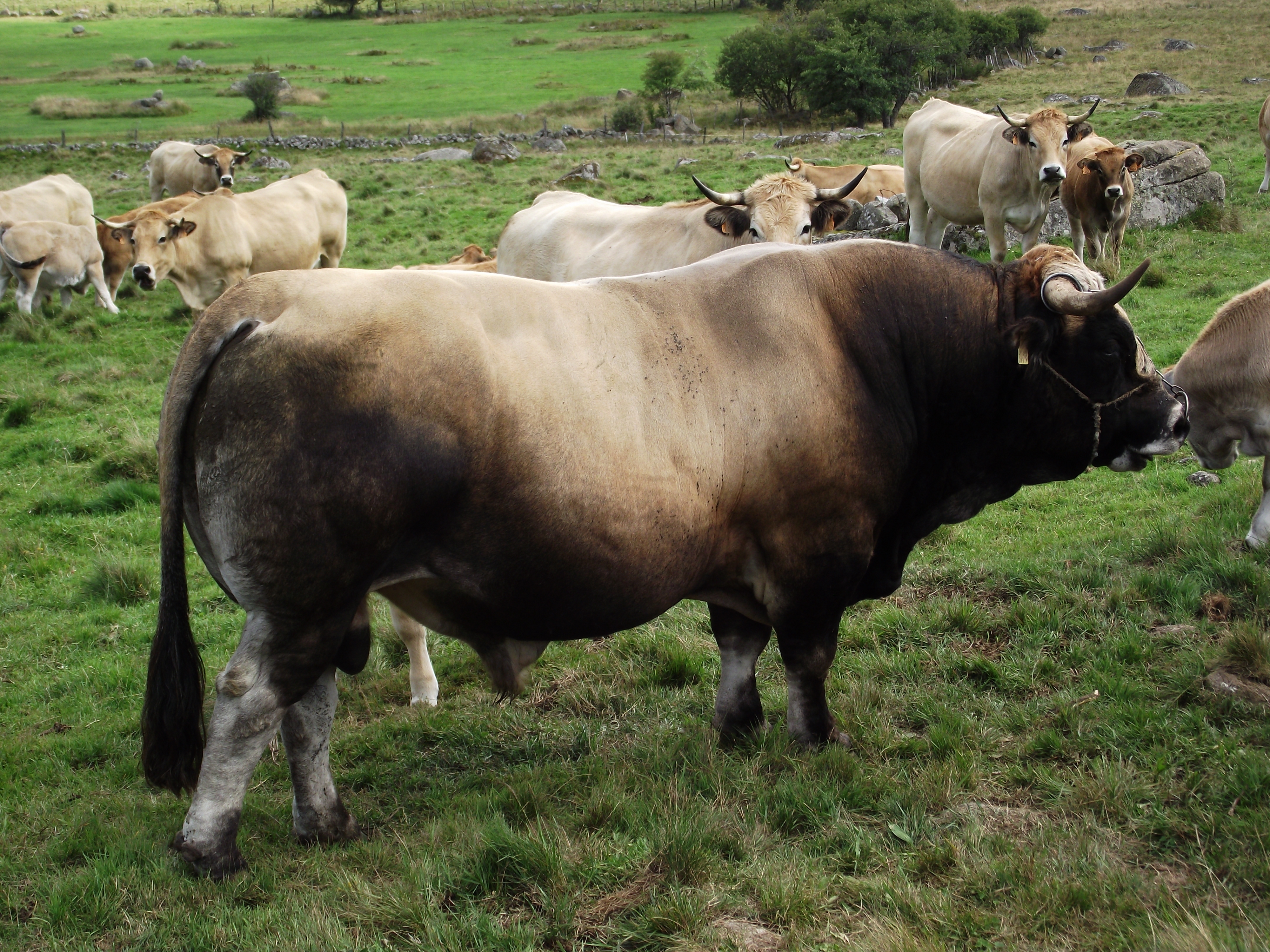 Taureau Aubrac adulte